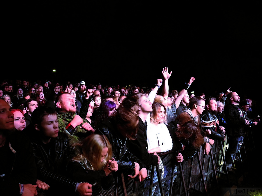 Muusikafestivali Hard Rock Laager 2017 publik rootsi ansambli Katatonia esinemise ajal.